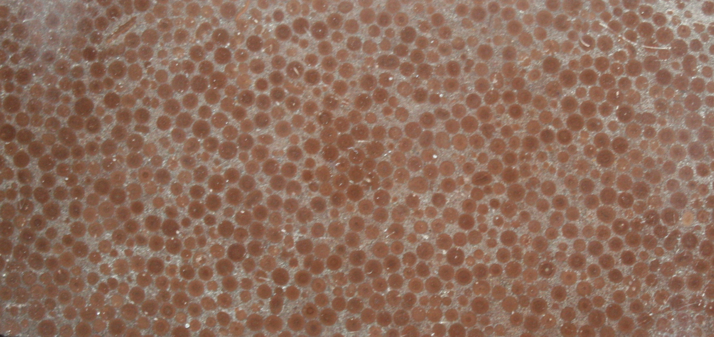 Braunschweiger Rogenstein, geschliffen, Muster ca. 9×4 cm